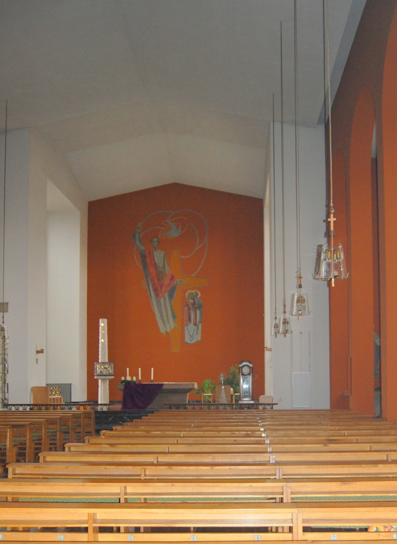 Innenraum der kathl. Peter-und-Paul-Kirche in Naumburg